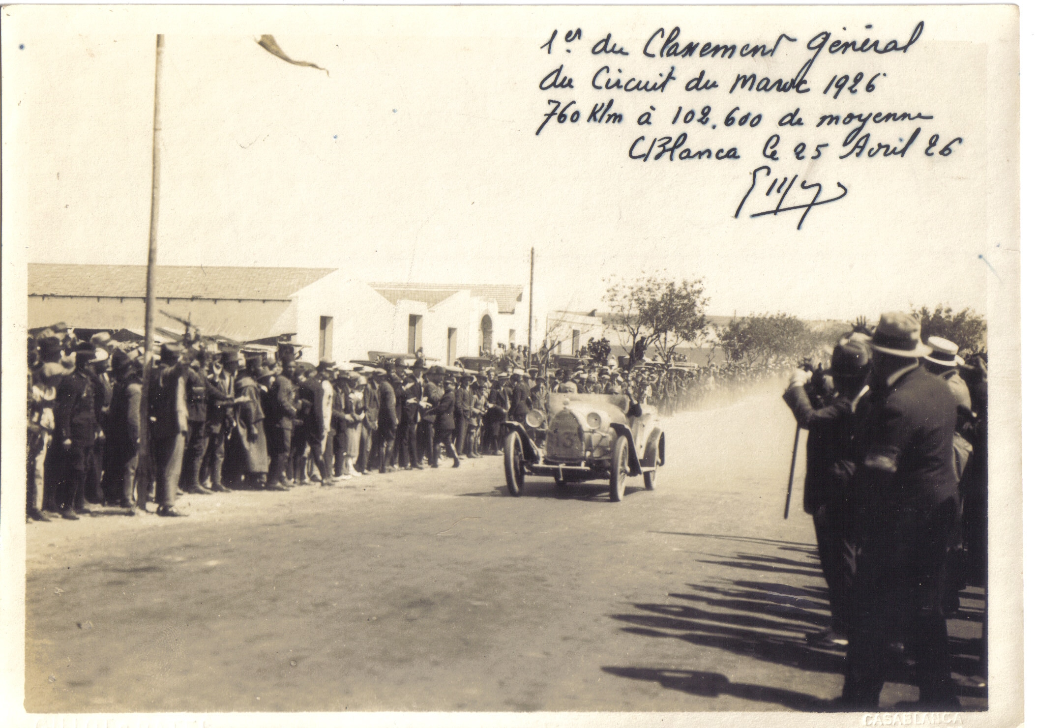 Photo annotée de la main d’Édouard Meyer de son arrivée en vainqueur du circuit du Maroc de 1926.